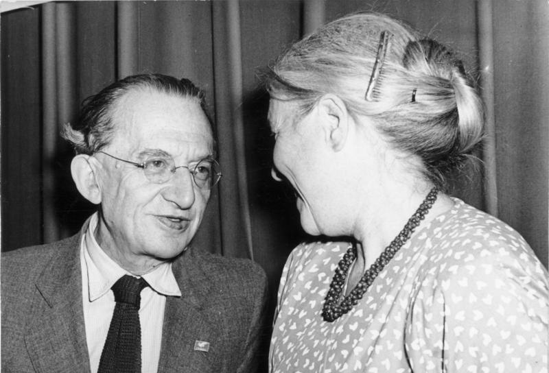 Zentrlabild/Sturm 3.7.1952 Ausserordentliche Tagung des Weltfriedensrates vom 1.- 5.7.52 im Haus der VAB in Berlin UBz:: Der ungarische Schriftsteller Prof. Georg Lukacz im Gespräch mit Stalinfriedenspreisträgerin Anna Seghers.